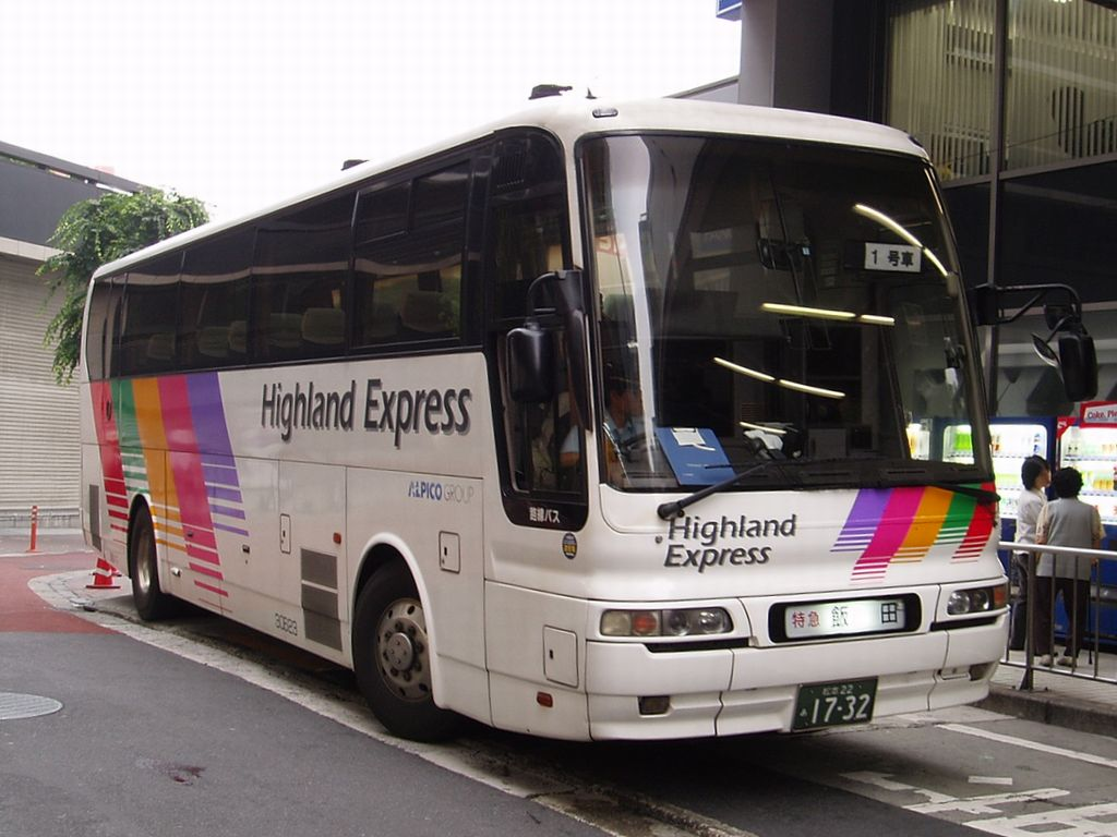 Suwa Bus 30623 "Chuo Highway Bus" Mitsubishi KC-MS822P at Shinjuku Highway Bus Terminal